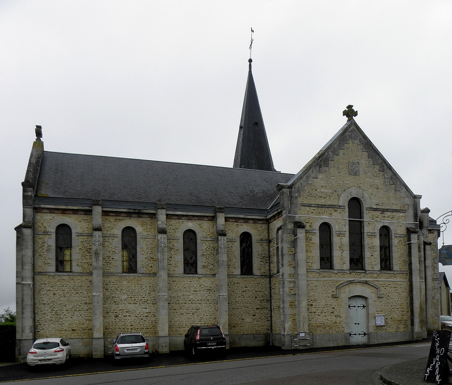 Église Sainte-Marie-Madeleine d'Héloup (61). Flanc sud.